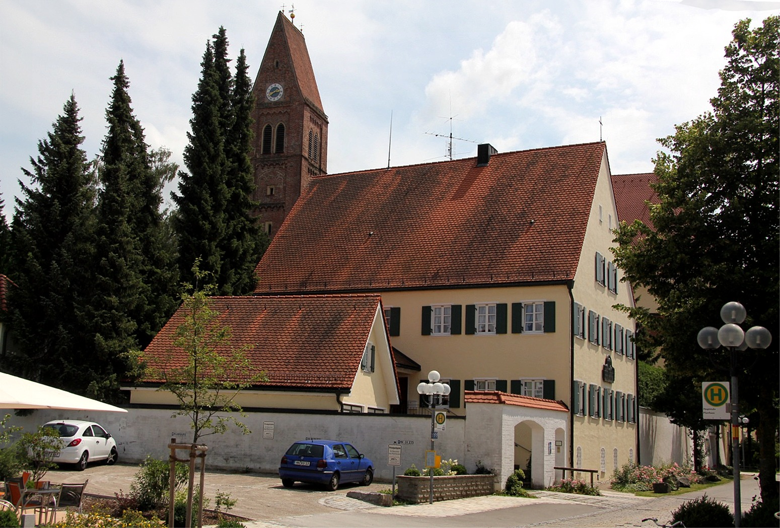 Pfarrhaus Bad Wörishofen, dahinter Pfarrkirche St. Justina